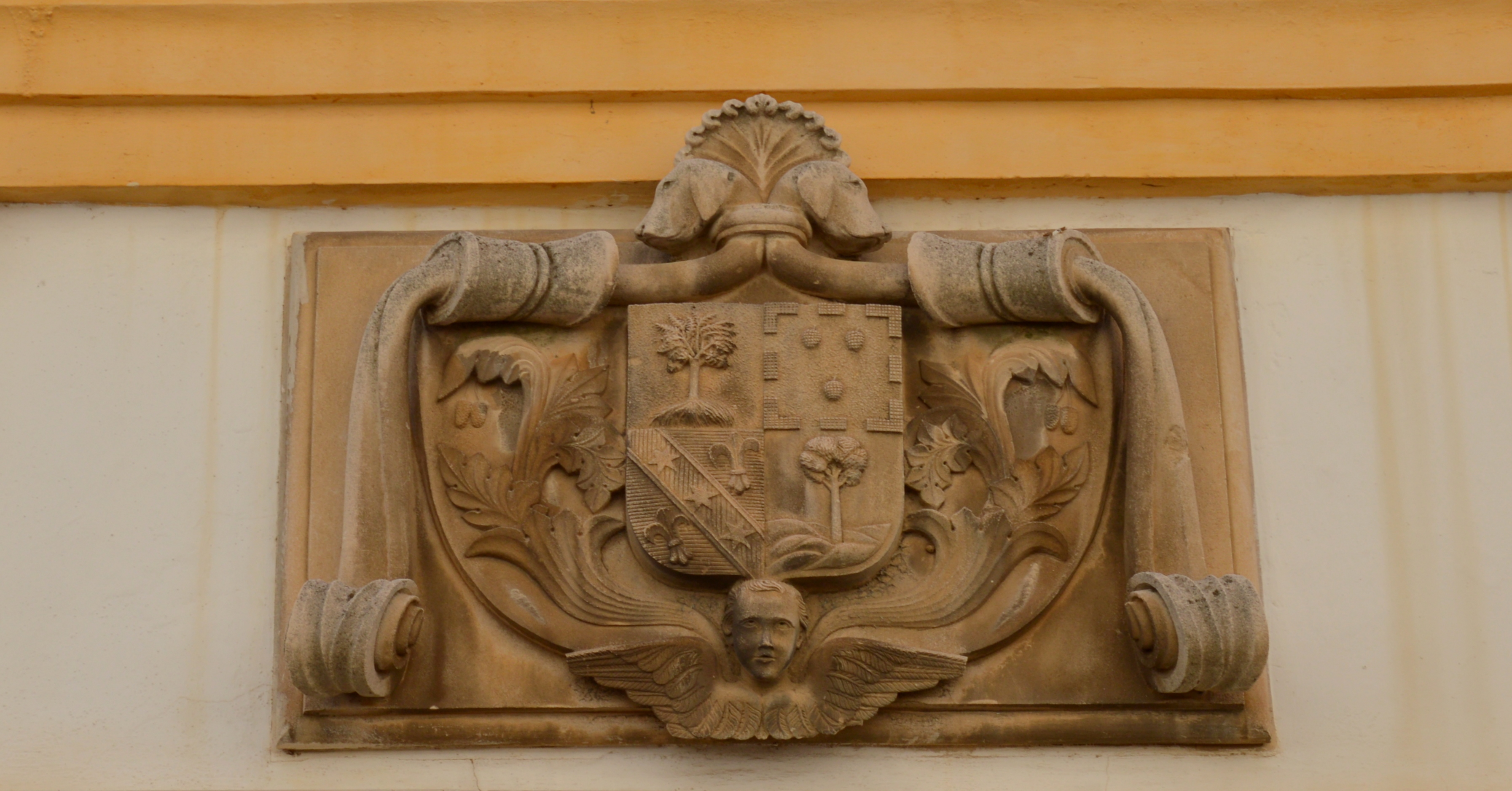 Details Can Moragues